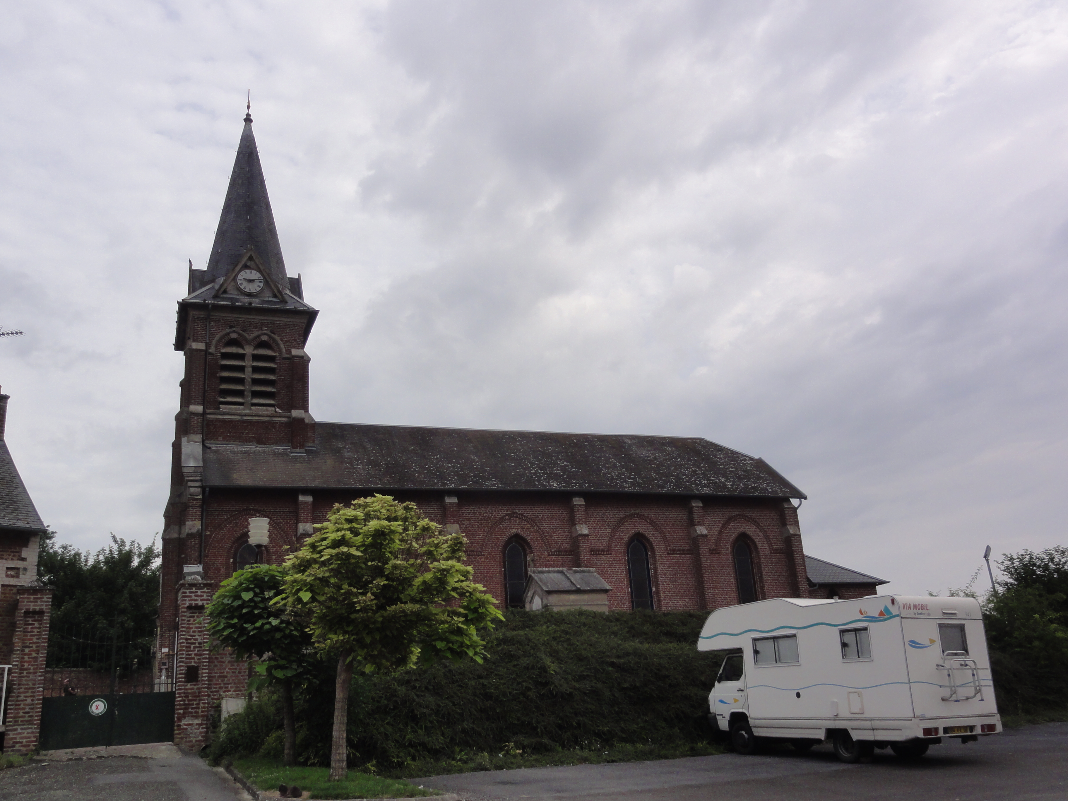 Lehaucourt (Aisne) église